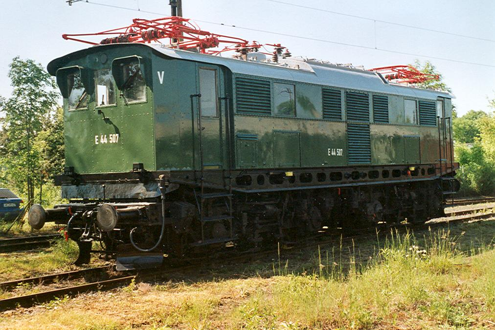 E 44 507 auf einer Ausstellung in Weimar